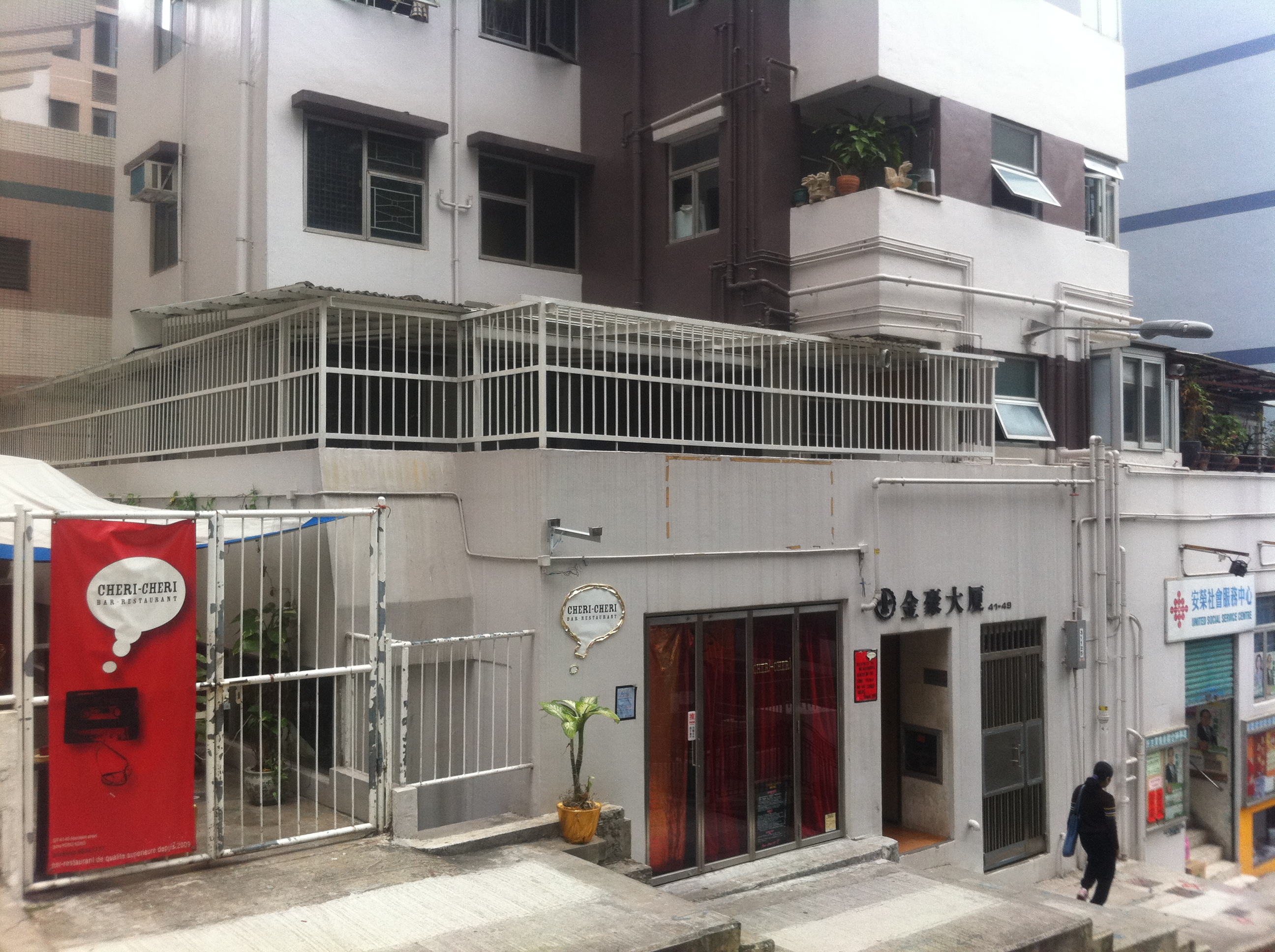 中文（香港）: 香港島 上環 鴨巴甸街41-49號 金豪大廈